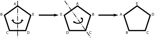 La composizione di due riflessioni genera una rotazione del pentagono. The composition of two reflections is a rotation of the pentagon.